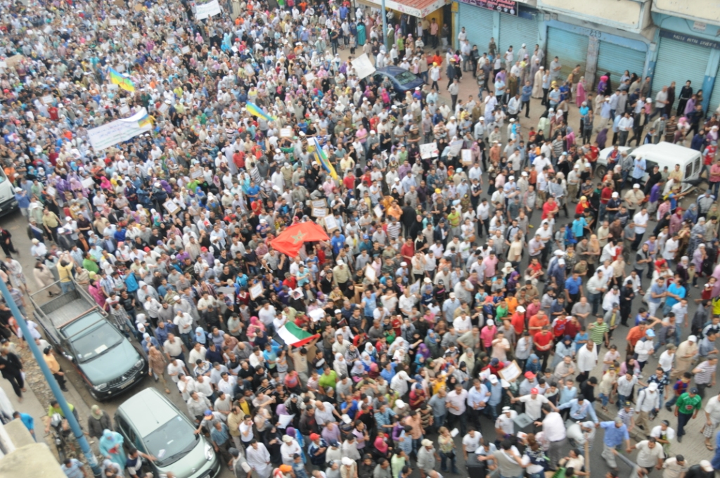 [Imrane Binoual] Young people turn out en masse to lobby for a role in the nation's future. خروج الشباب بكثافة للضغط من أجل الاضطلاع بدور لرسم مستقبل البلاد Les jeunes se rassemblent en masse pour demander à jouer un rôle dans l'avenir de leur pays.